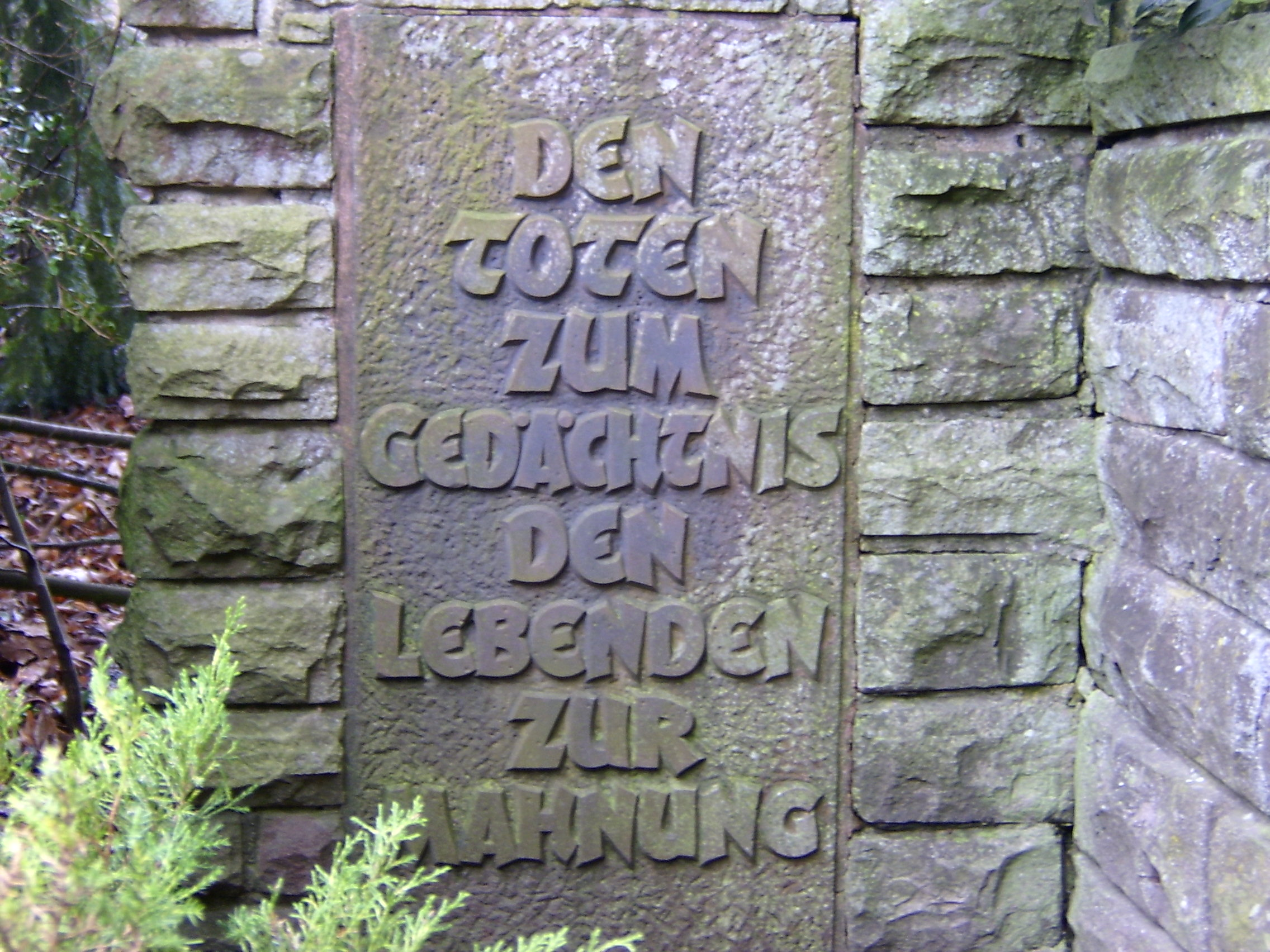 Gedenkstein in Badenhausen für die Opfer der beiden Weltkriege